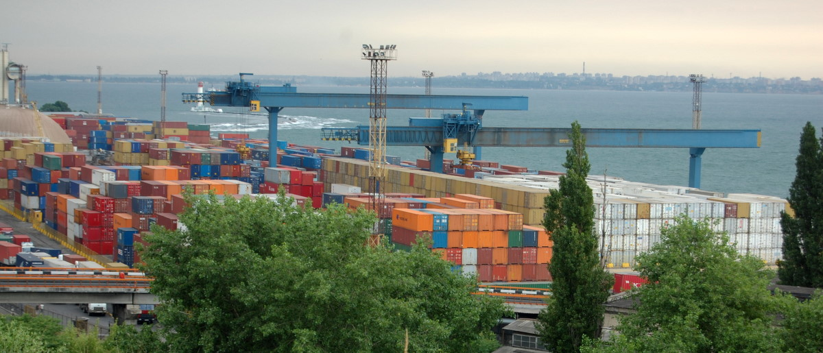 Одесский порт